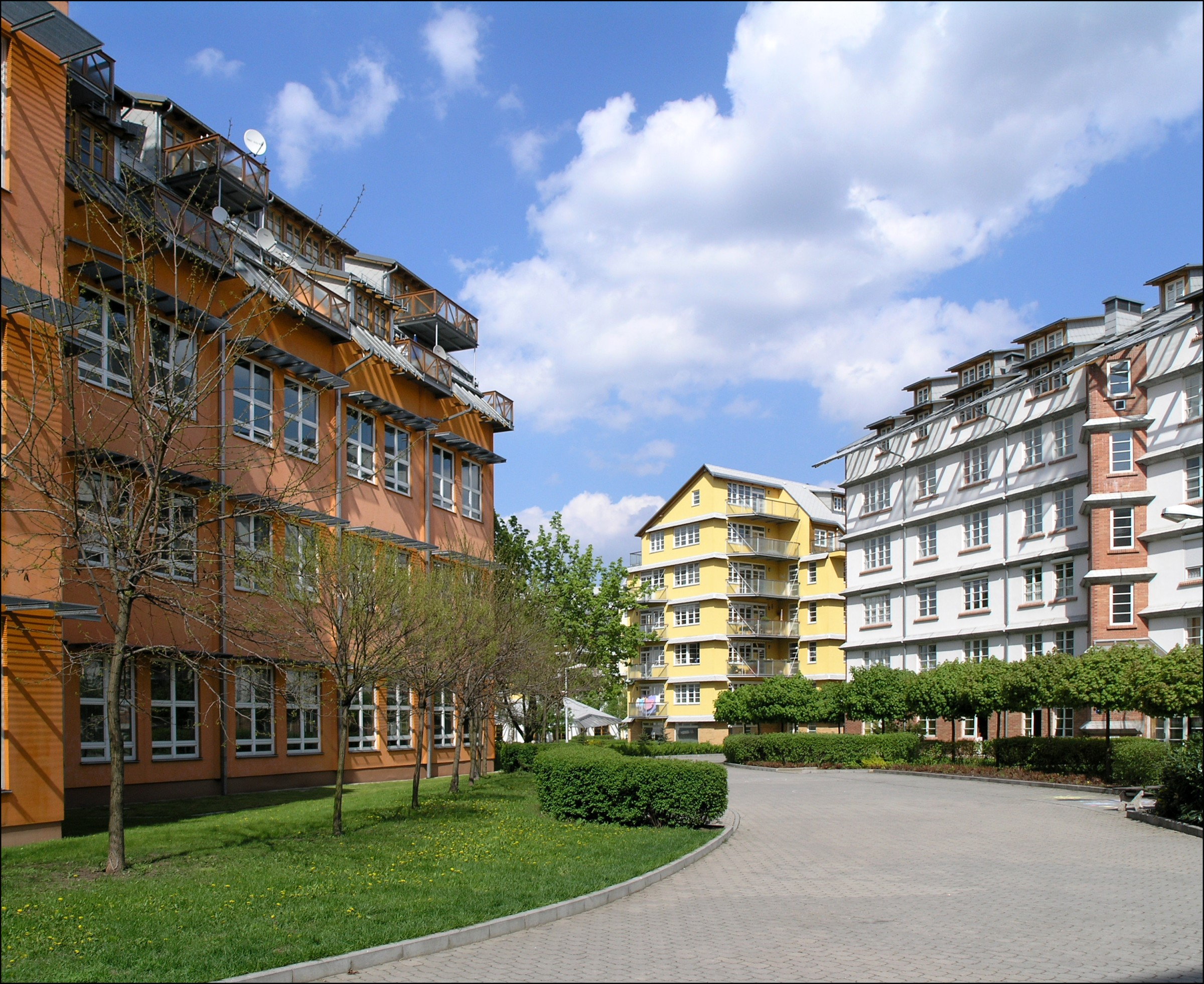 Česky: Praha-Veleslavín, sídliště Hvězda - architekt Vlado Milunić. Pláničkova, vlevo dům Na okraji 335/42+42b+42c, vpravo dům Pláničkova 442/1+3, vzadu dům Křenova 439/13.